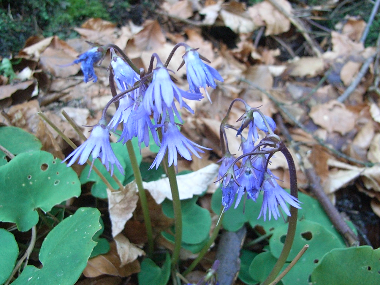 Soldanella montana bei Zwiesel, Bayerischer Wald